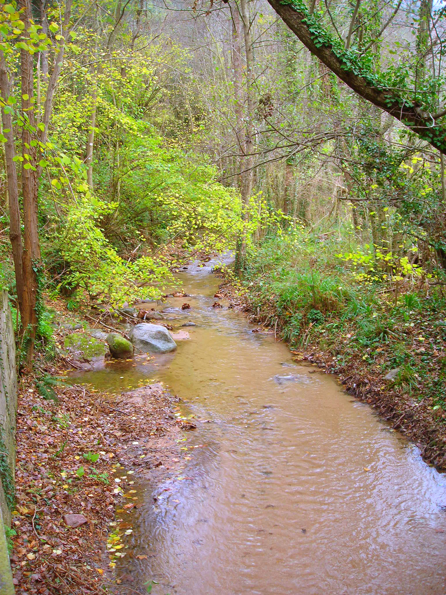 Riera d'Arbúcies